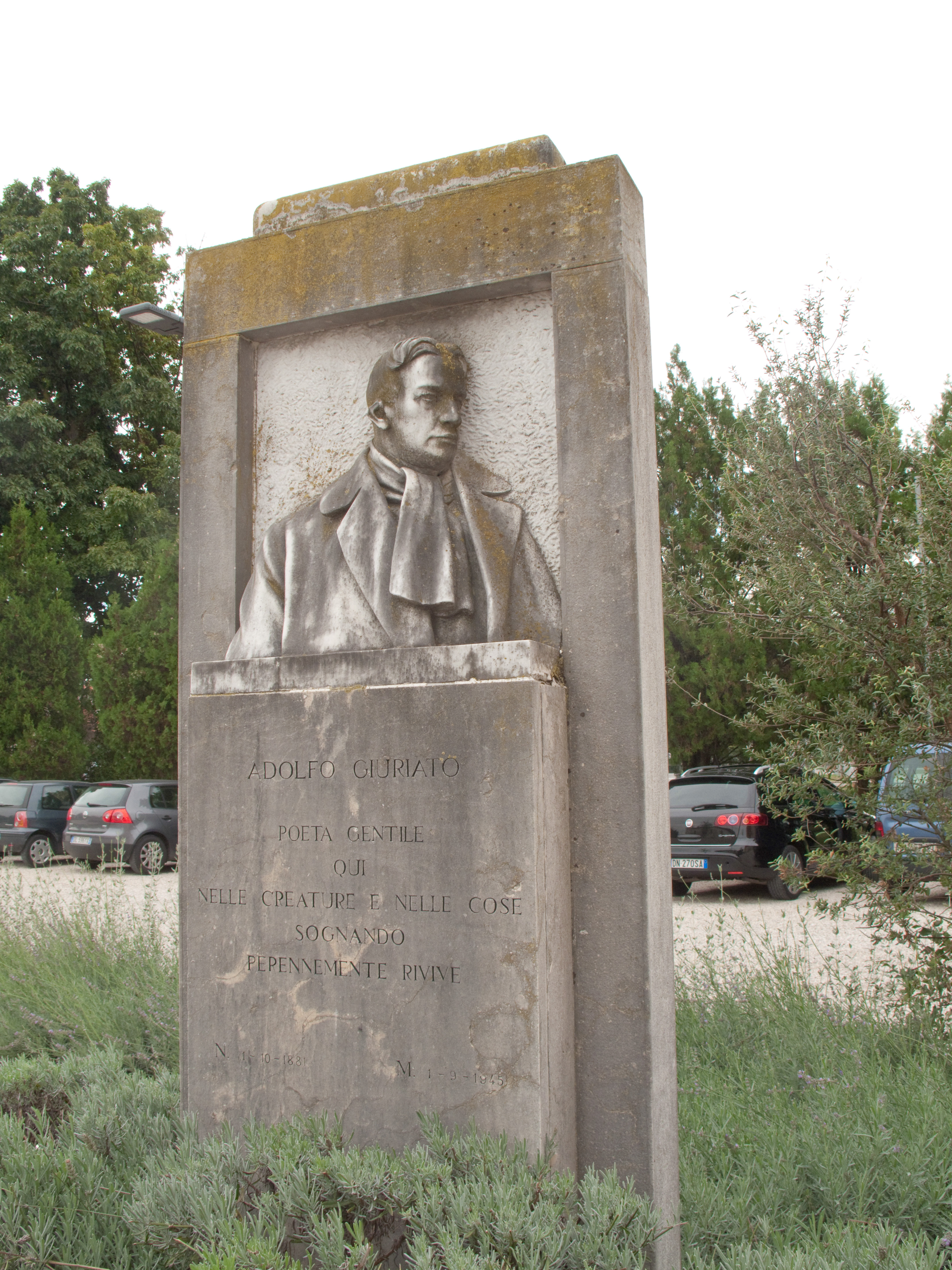 Monumento ad Adolfo Giuriolo